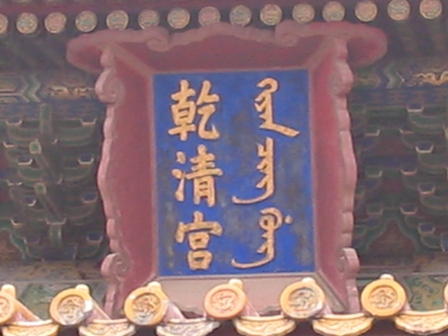 乾清宫牌匾